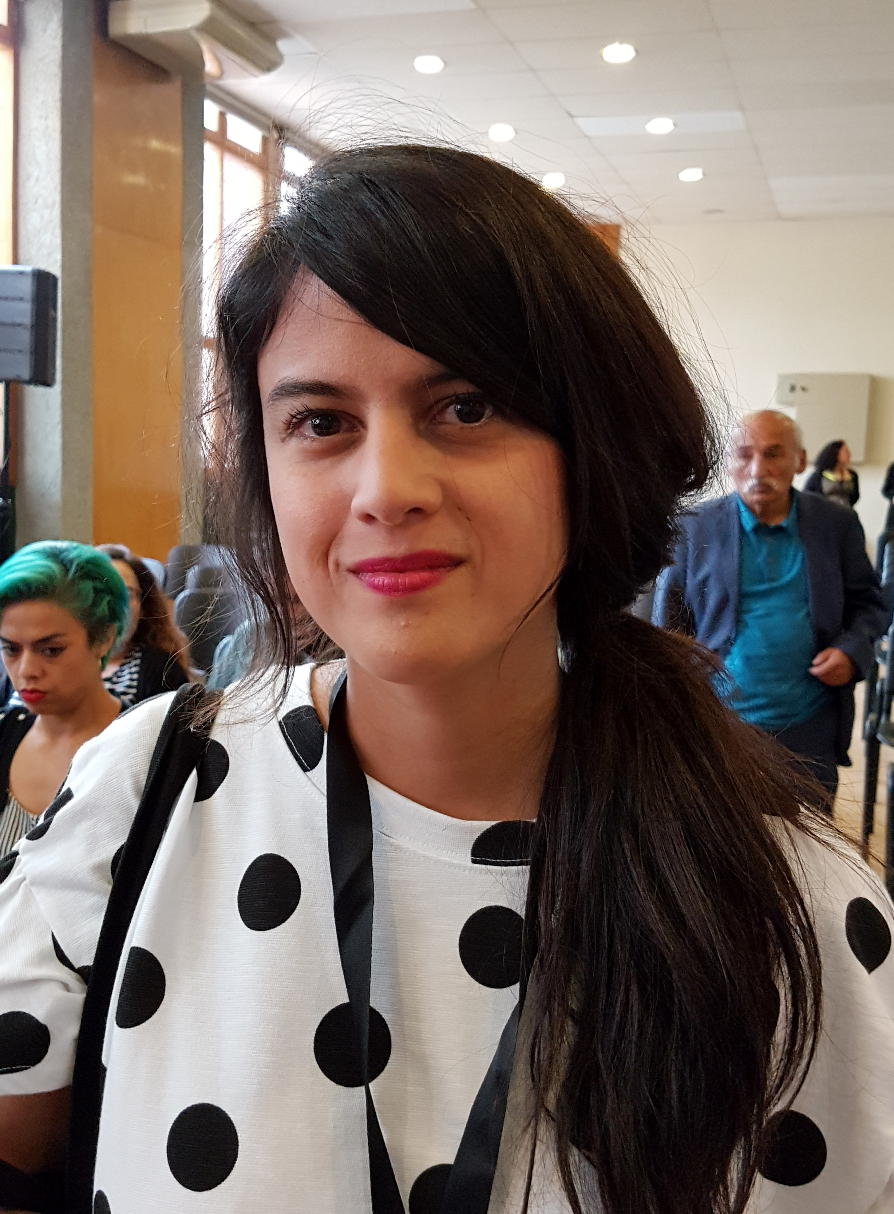 La escritora mexicana Brenda Lozano en la Feria Internacional del Libro de Santiago 2017.